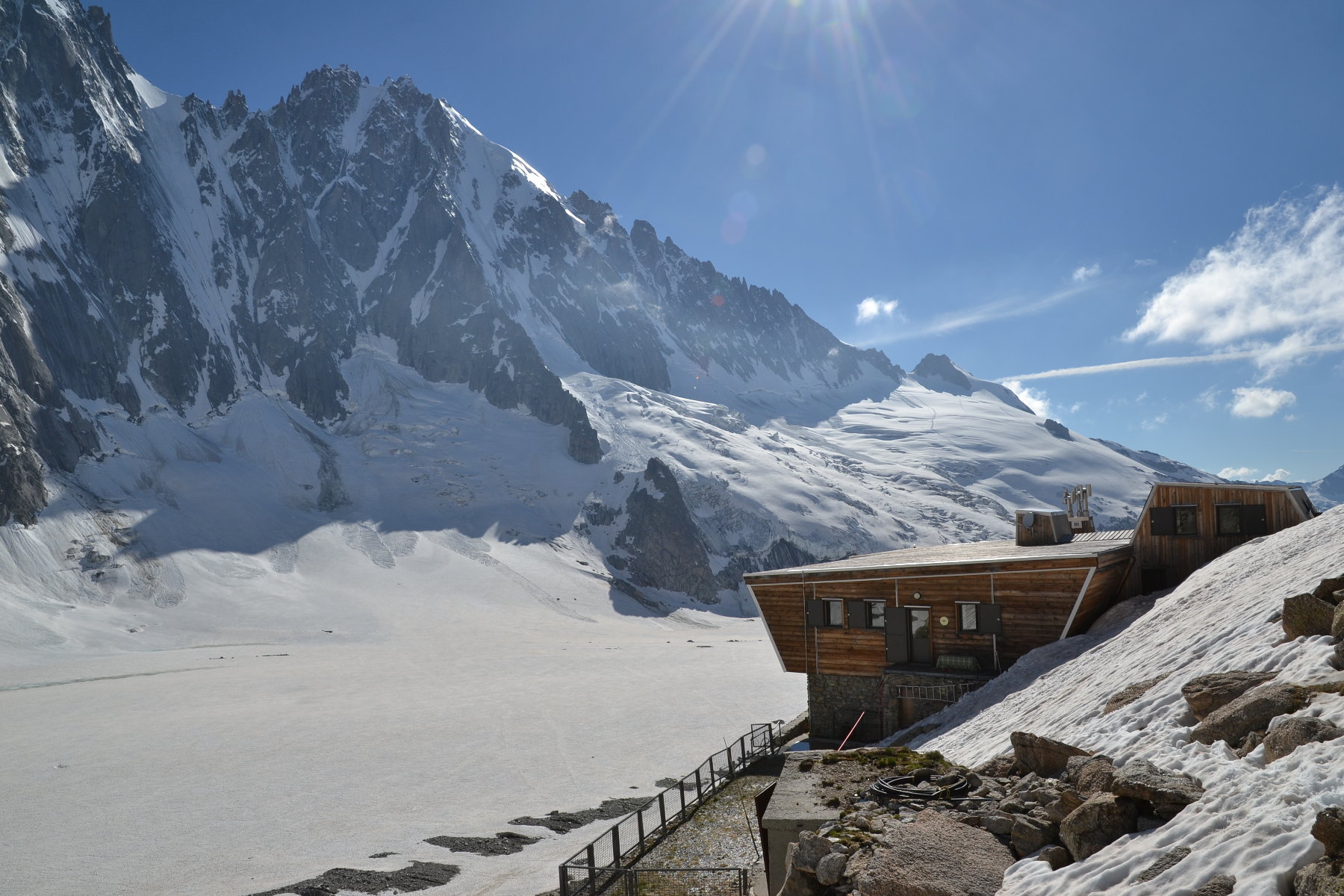 Refuge d'Argentière, CAF, 2771m